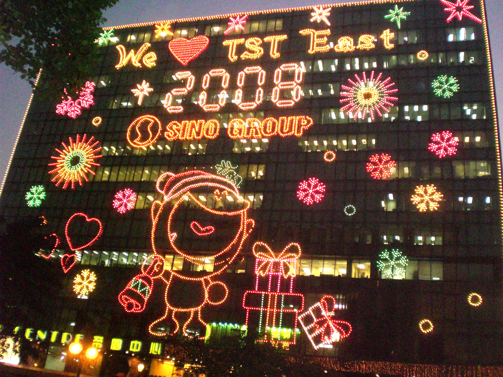 帝國中心, 尖東